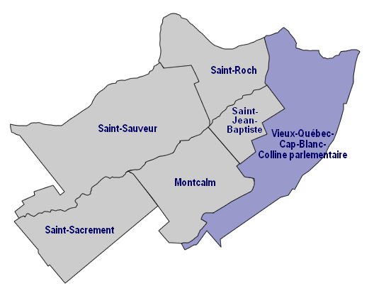 Quartier du Vieux-Québec, Ville de Québec.